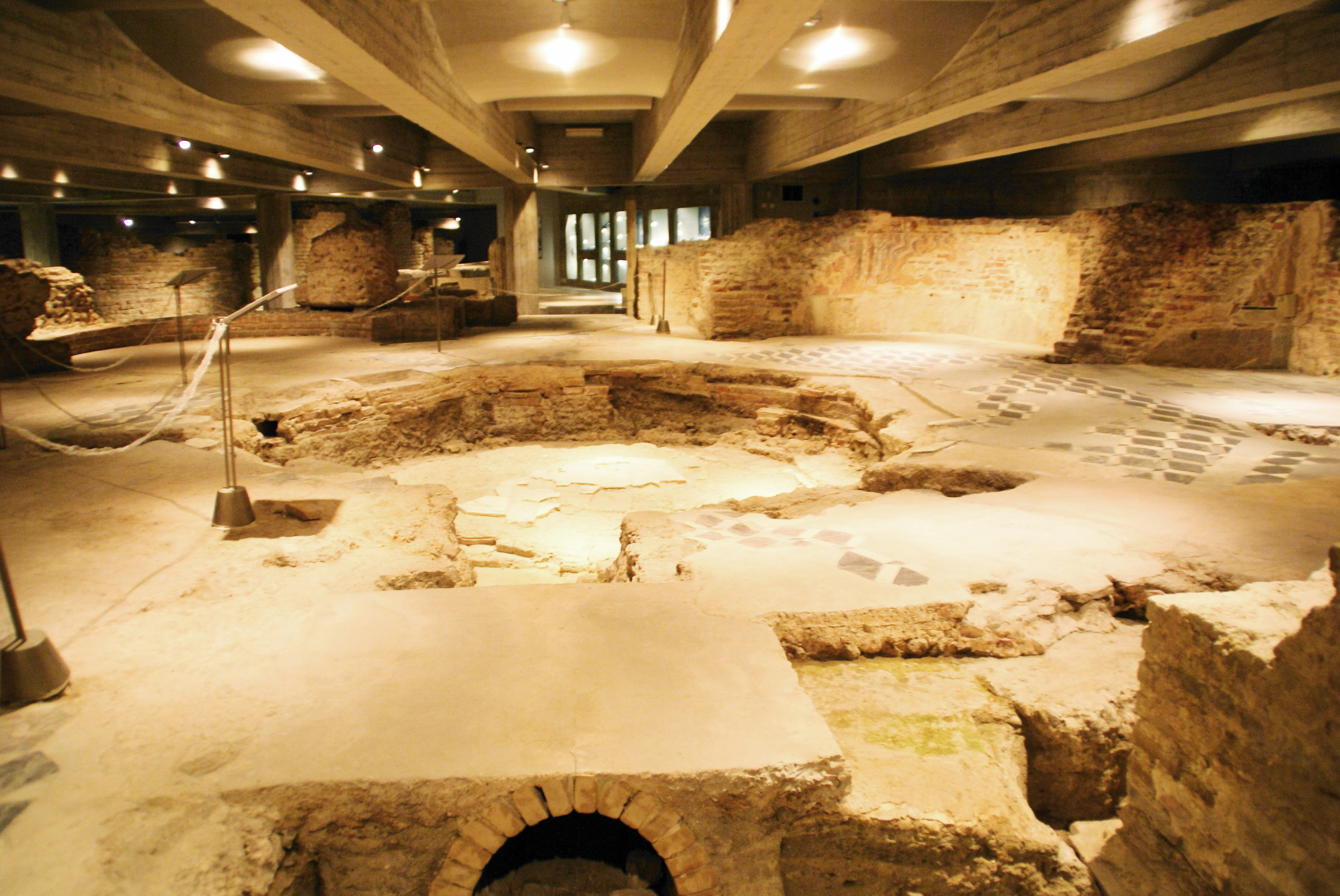 Baptisterium im Mailänder Dom